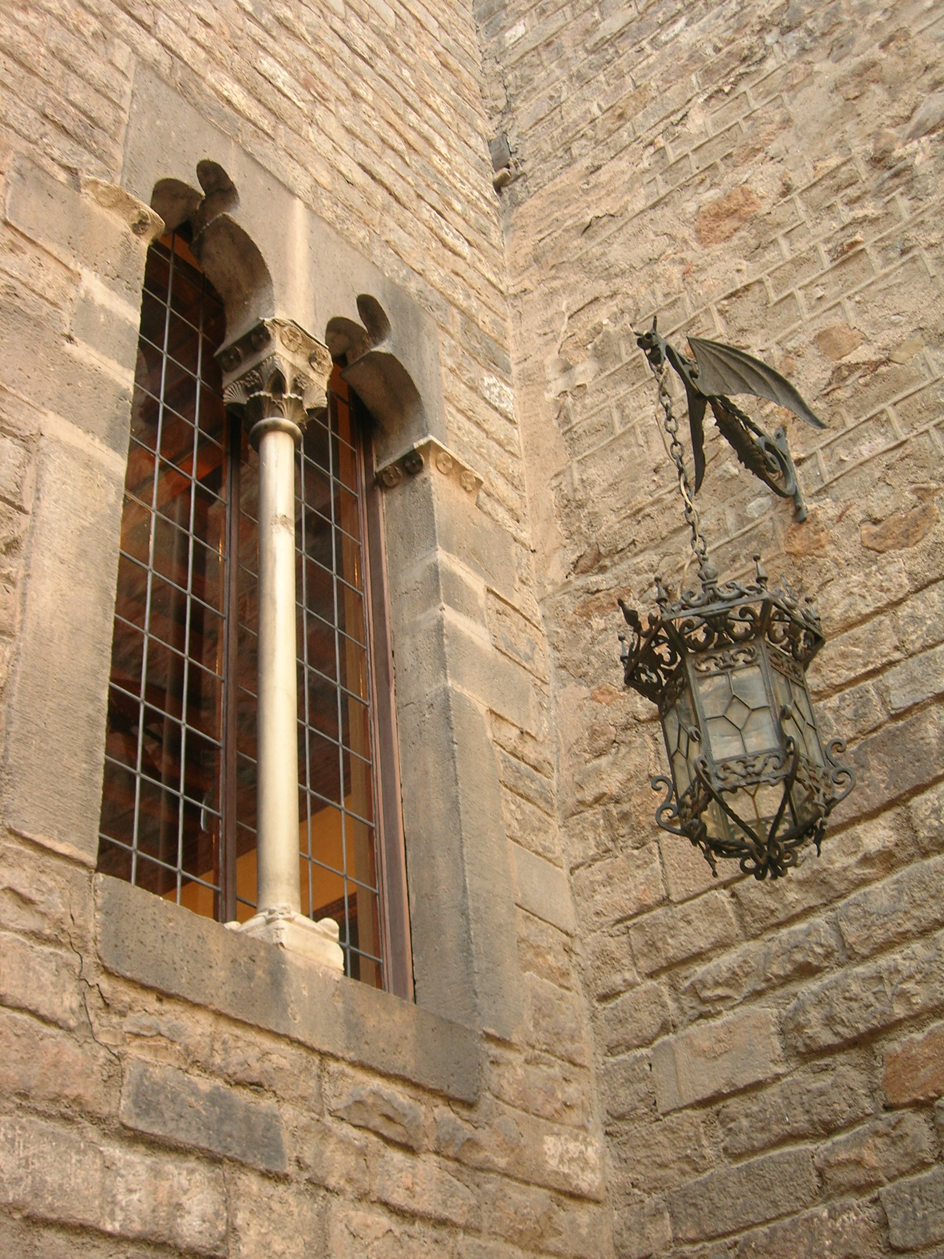 Palau Requesens (Barcelona), finestra coronella i drac fanal